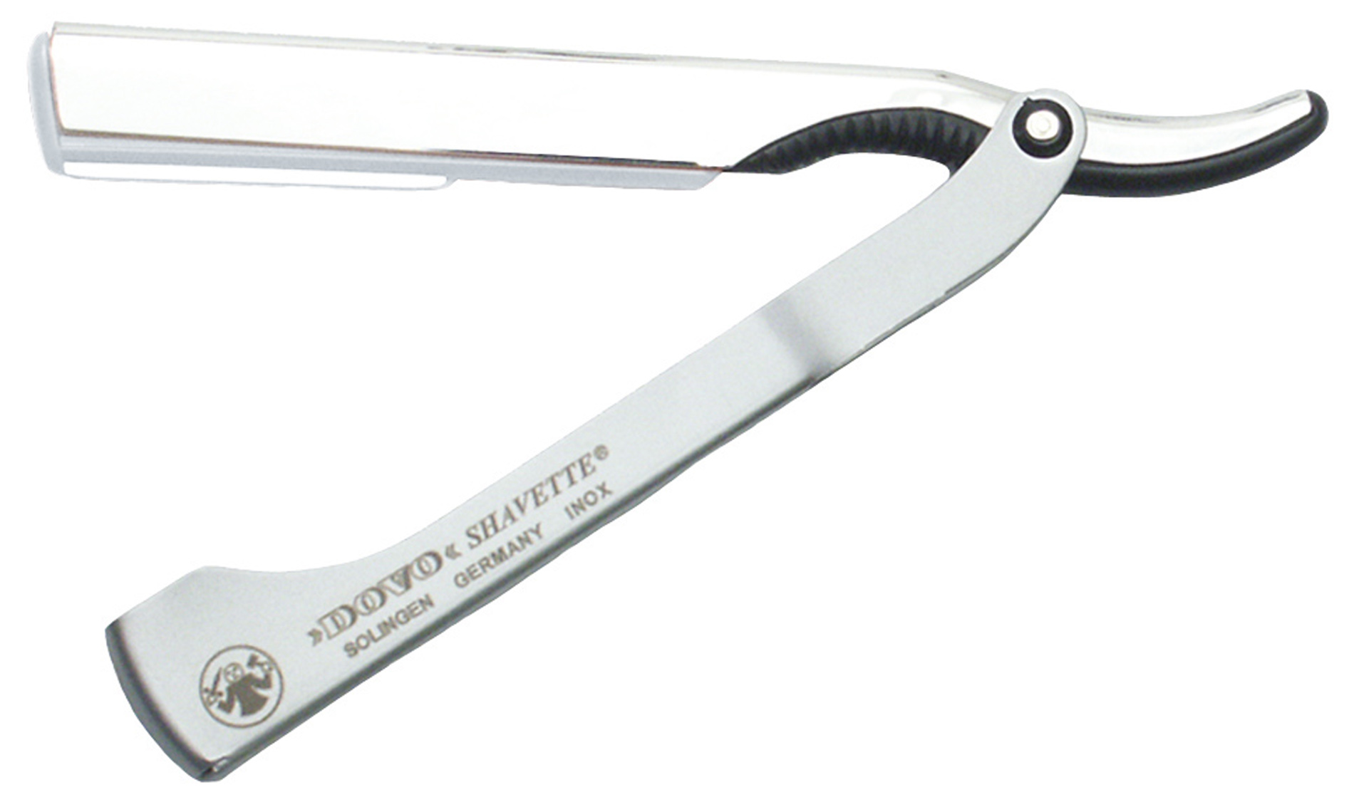 Das Bild umfasst ein Modell der weltweit bekannten "Shavette" der deutschen Firma DOVO Solingen.